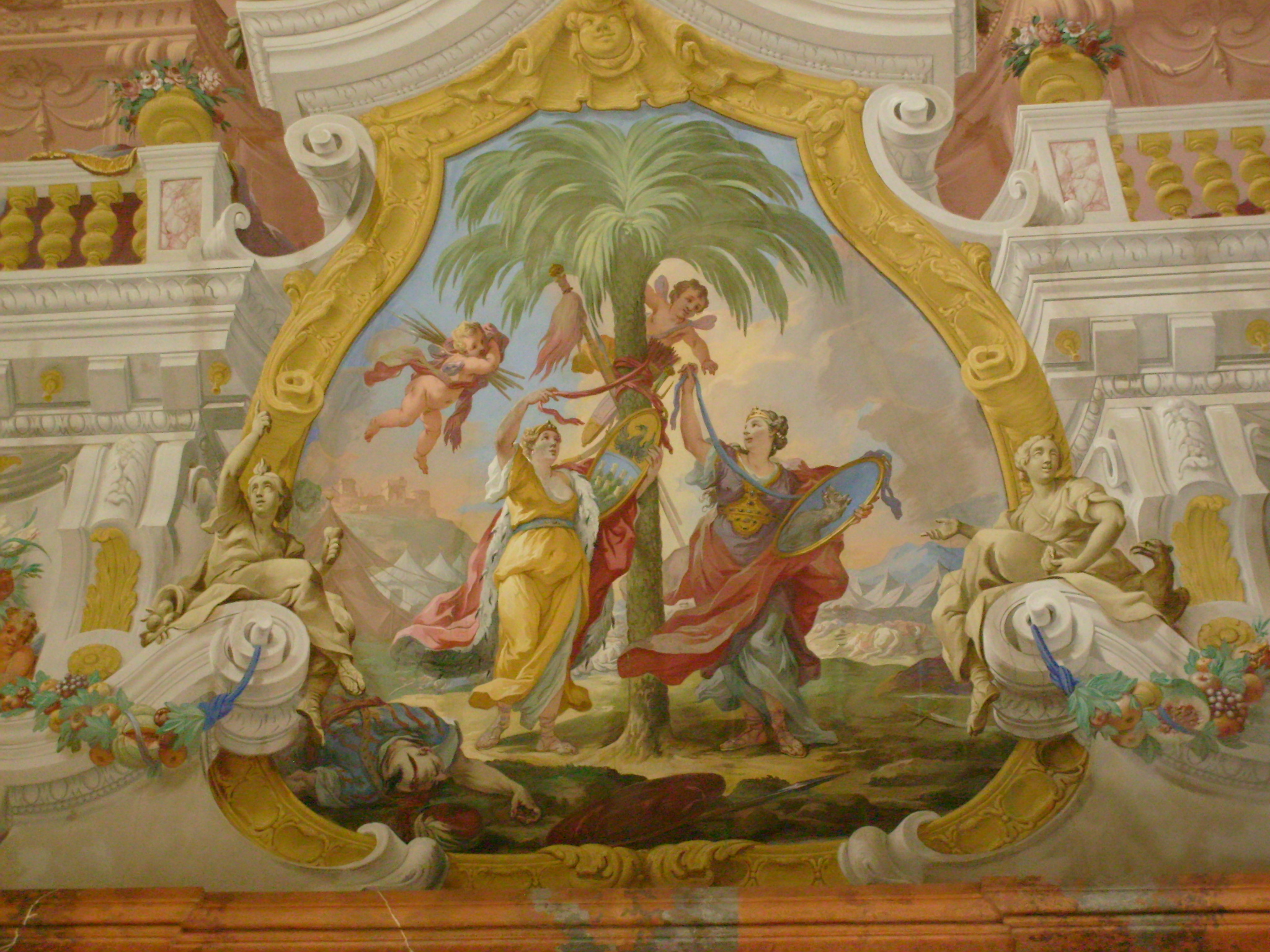 Allegorische Darstellung von Siebenbürgen und Serbien, Fresko von Altomonte. Siebenbürgen und Serbien legen ihre Waffen auf einer Palme auf. Unten ein besiegter Osmane. Augustiner Chorherrenstift St. Florian, Marmorsaal. 1723.